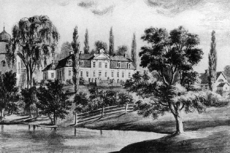 Палац Агінскіх в. Ручыца, Вілейскі раён, Мінская вобласць Акварэльны малюнак зроблены ў 1875—1877 гг., калі сядзіба належала Валенсу Ржавуцкаму.